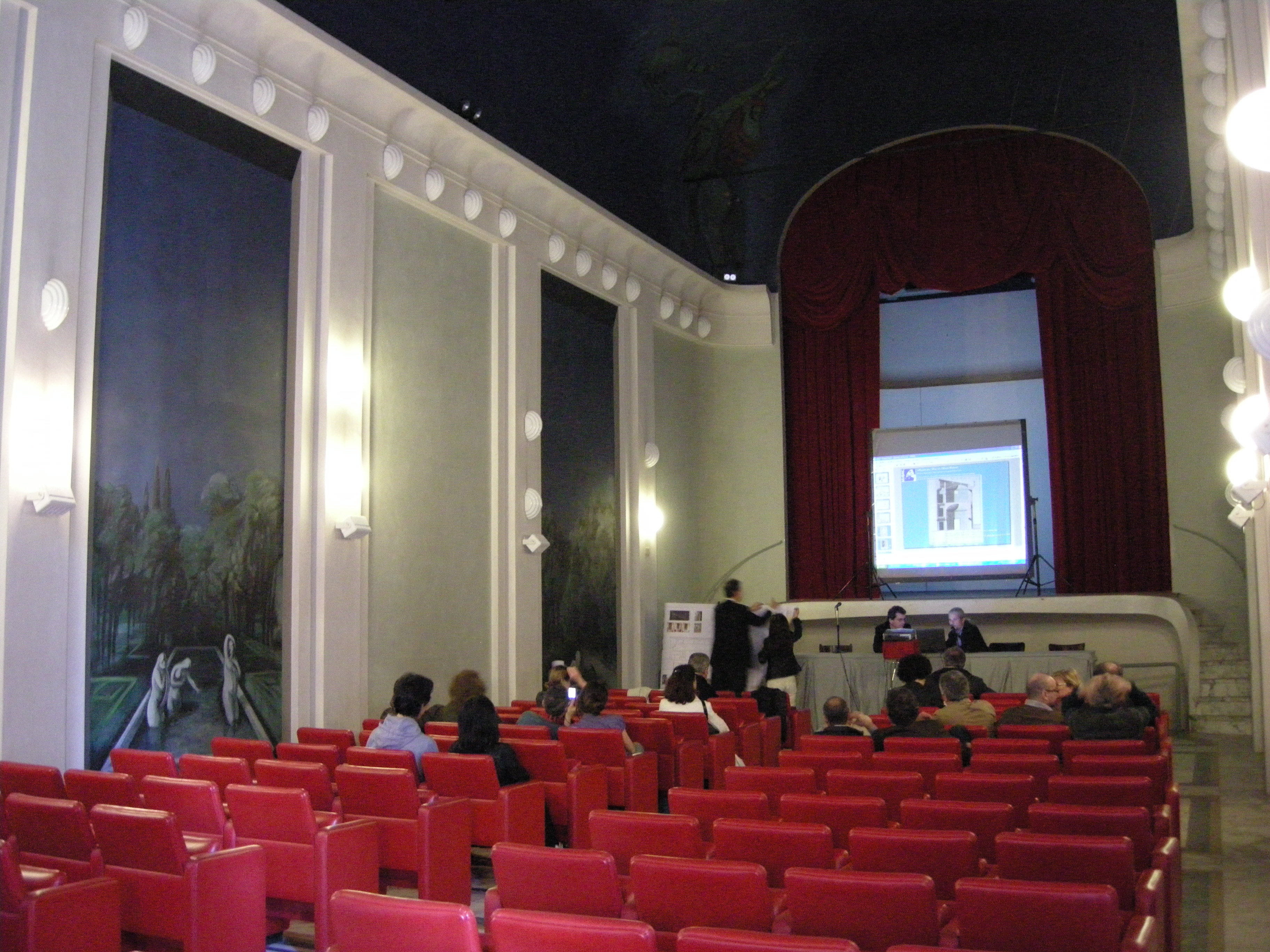 Teatro del rondò di bacco